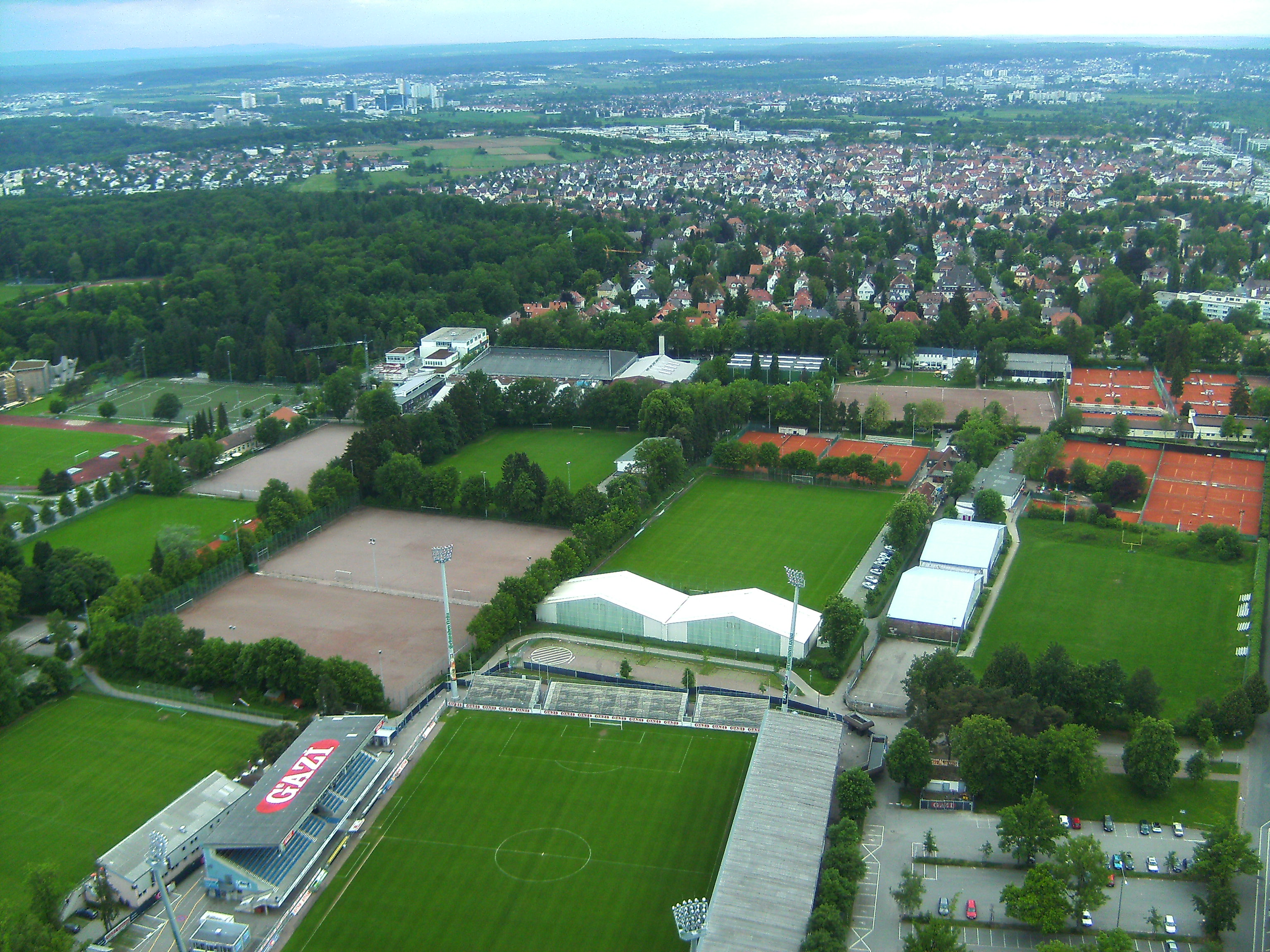 Aussicht vom Fernsehturm Stuttgart